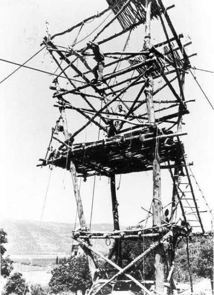 בנית מגדל צופי באחת ה"שומריות" הכינוס ה-4 שנתי של השומר הצעיר.